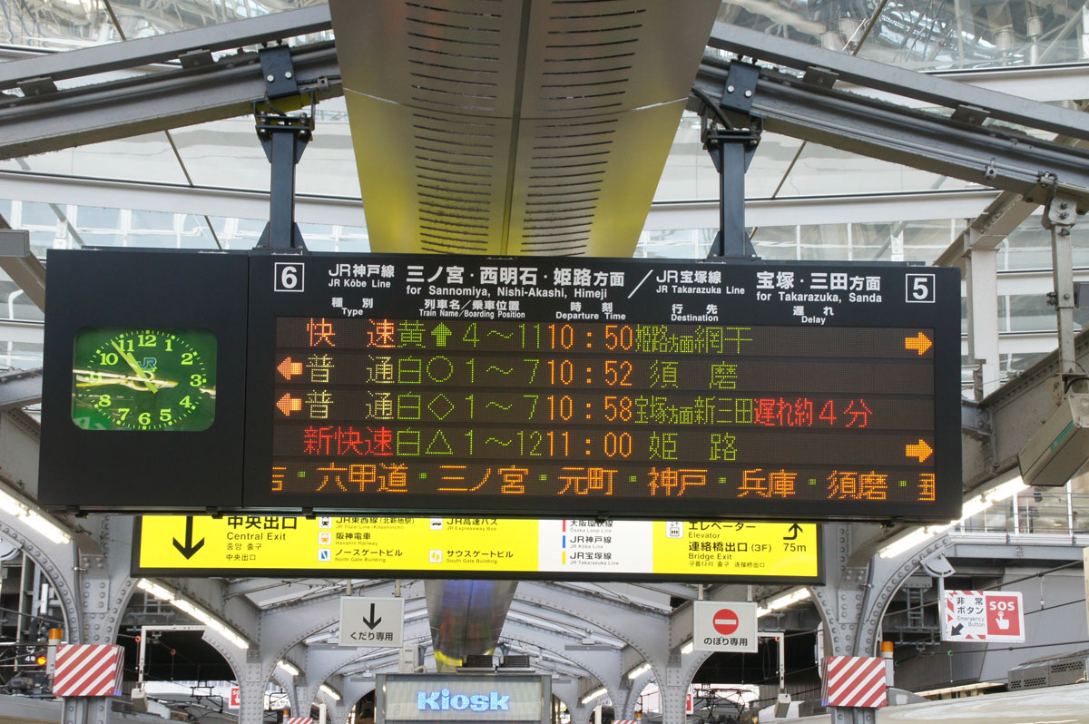 eine großformatige LED-Matrixanzeige auf einem Bahnhof in Japan, unter anderem mit Ankunfts- oder Abfahrtzeiten, Ziel[bahnhof] und Richtungsanzeige (über die rotgelben Pfeile nach links oder rechts) zu den zugehörigen Bahnsteigen (5 oder 6)